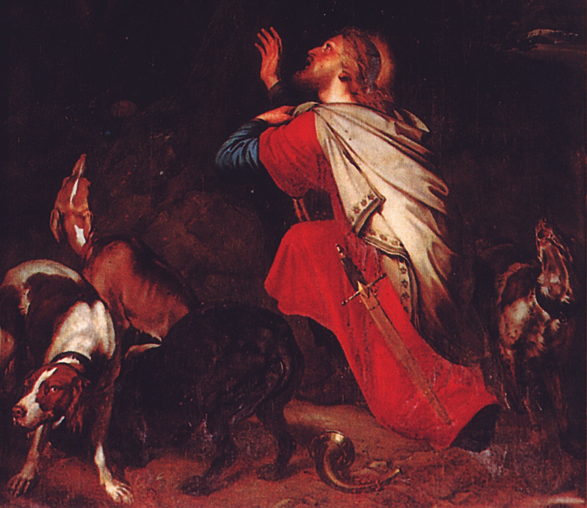 Altarbild, Heiliger Hubertus, Hubertuskapelle